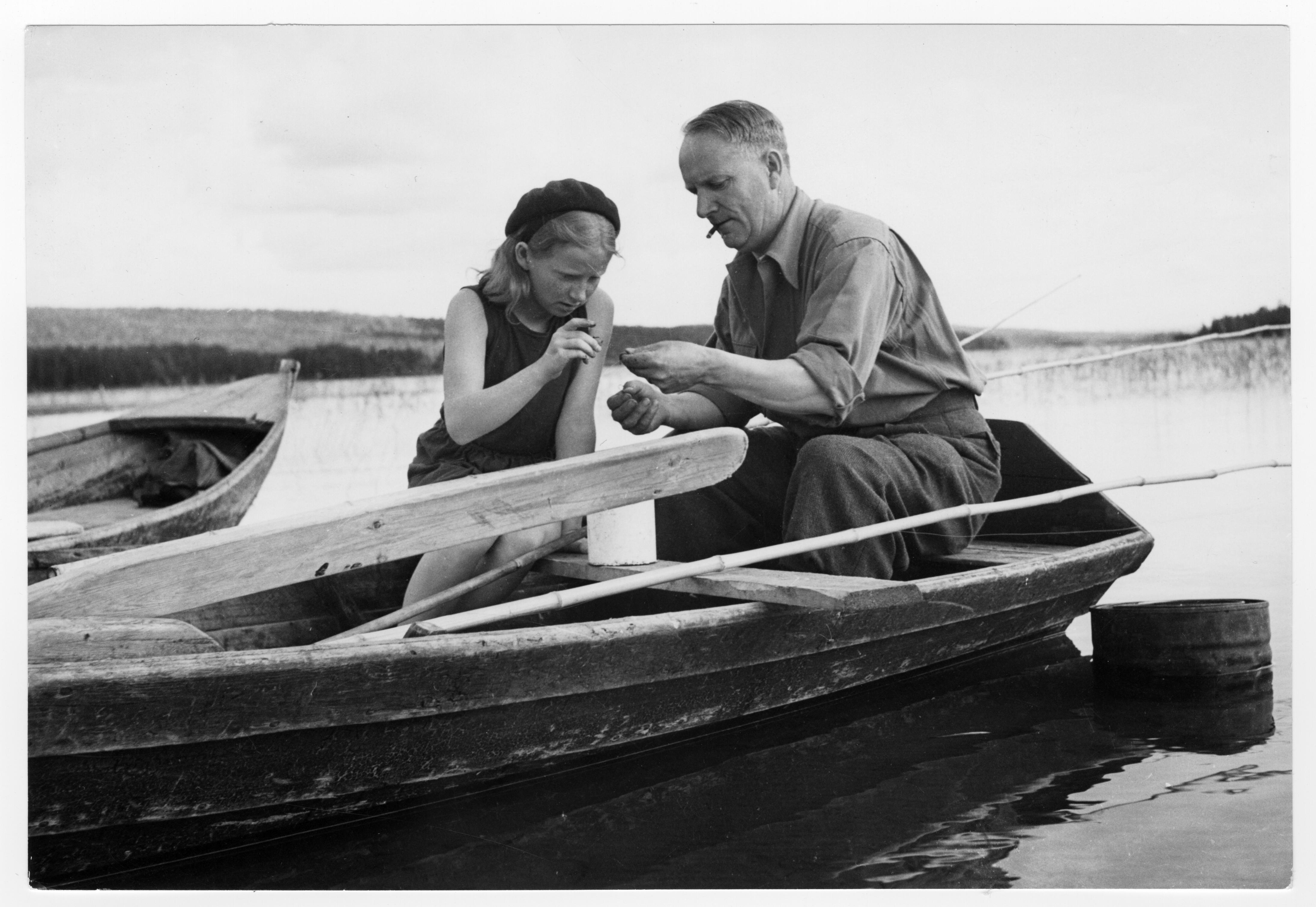 Hedlund var inrikesminister 1951-1957.